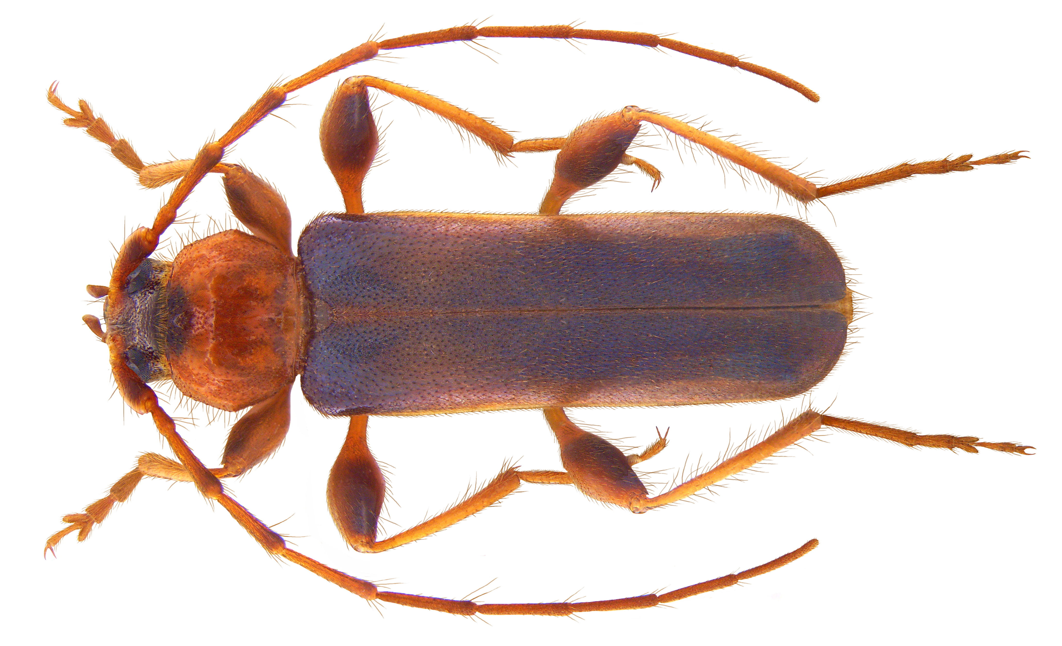 Familie: Cerambycidae Groesse: 12,8 mm Verbreitung: Europe, Nordafrika Ökologie: Entwicklung in Laubhölzern, besonders in Eiche Fundort: Germania, Bayern, Oberpfalz, Pressath leg. G.Uhmann, 1972; det. G.Rößler, 1972 Photo: U.Schmidt, 2009